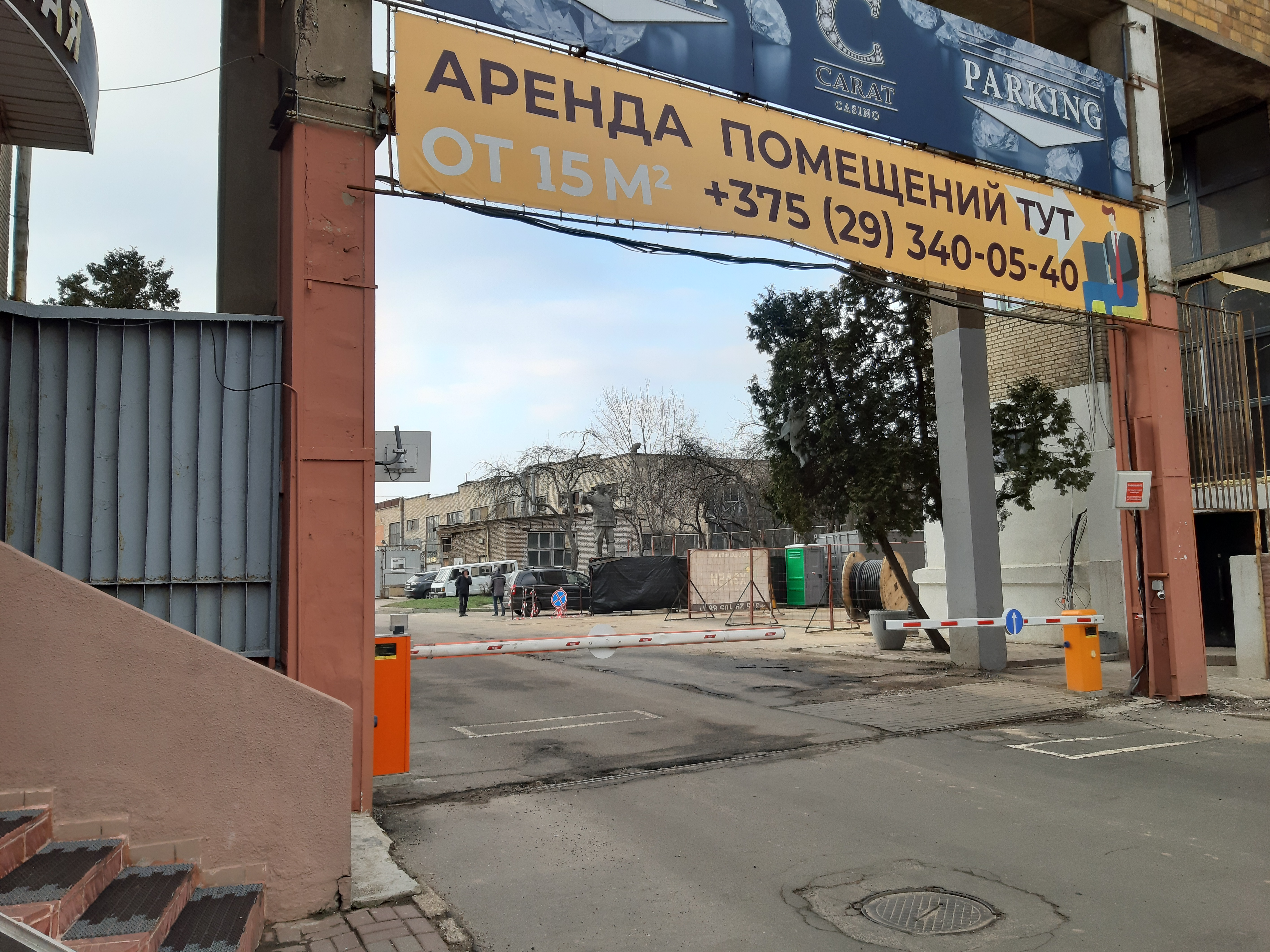 Мінск. Ад Оперы да Сурганава. 2020